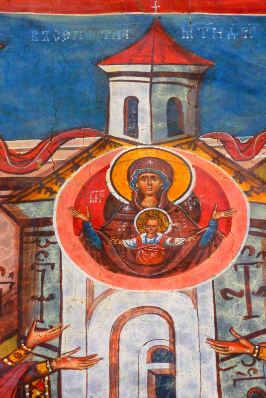 Watra Mołdowica [Vatra Moldoviţei], cerkiew, fresk